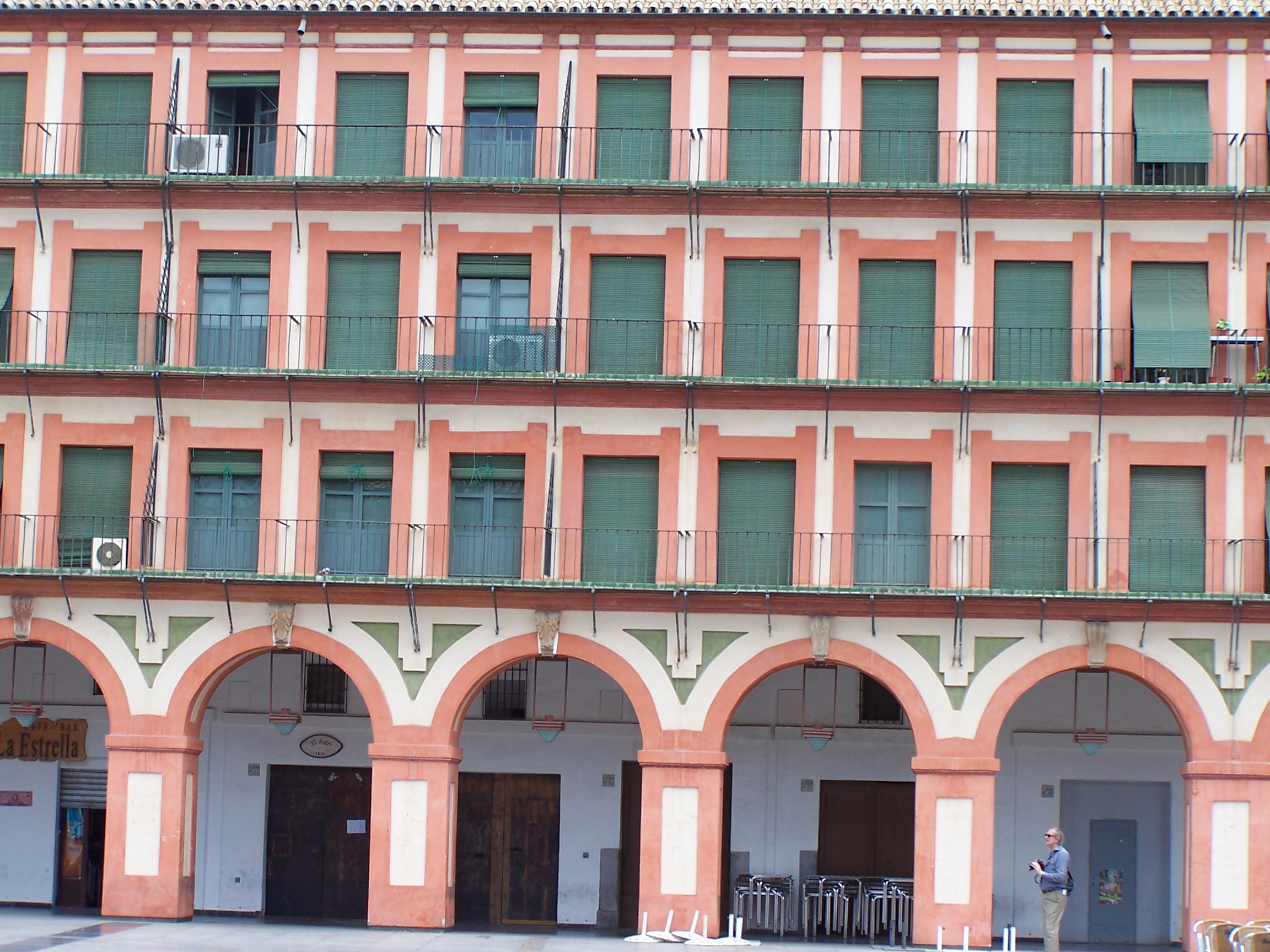 Detalle de los edificios en la Plaza de la Corredera (Córdoba, España), imagen tomada en 2005